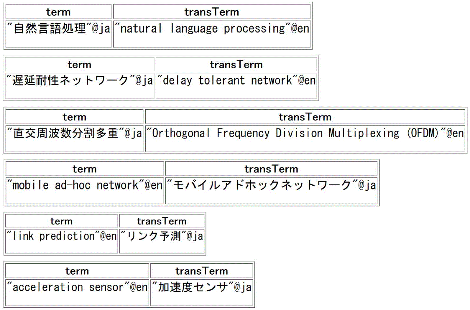 共起頻度に基づいた日英・英日辞書機能